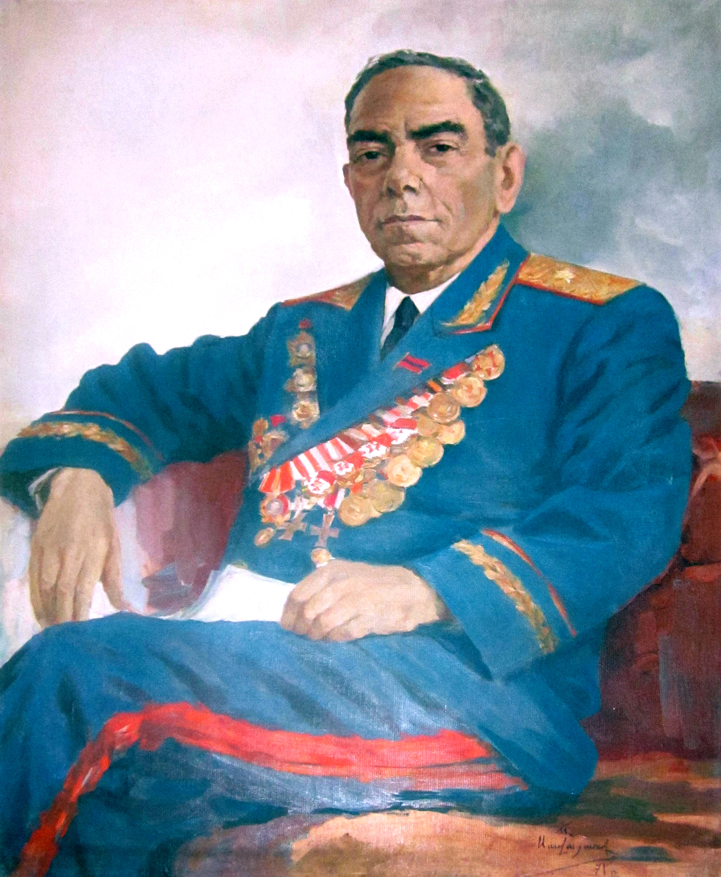 Генерал-майор Нвер Сафарян - Командир 89-ой стрелковой дивизии